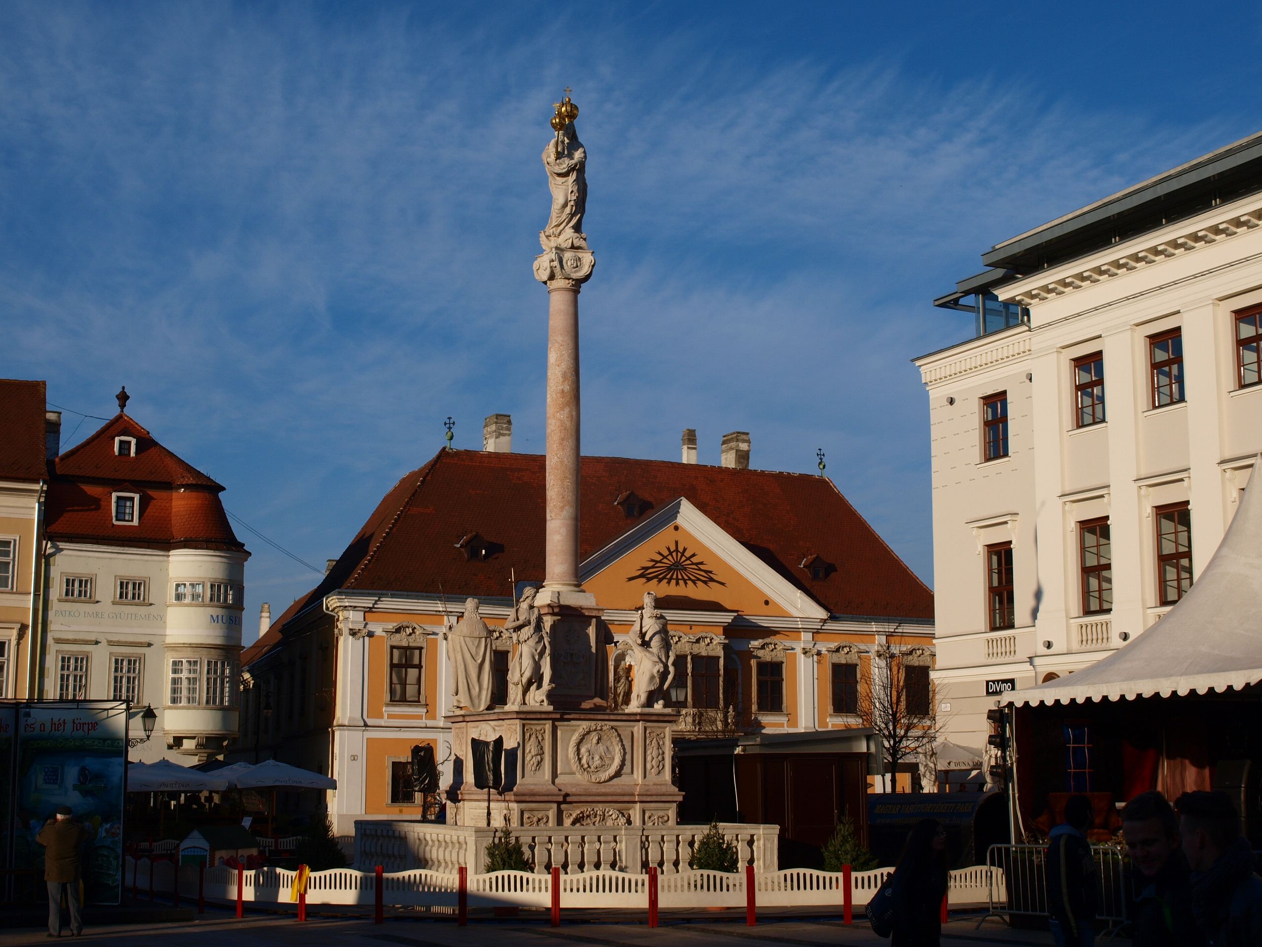 Győr náměstí